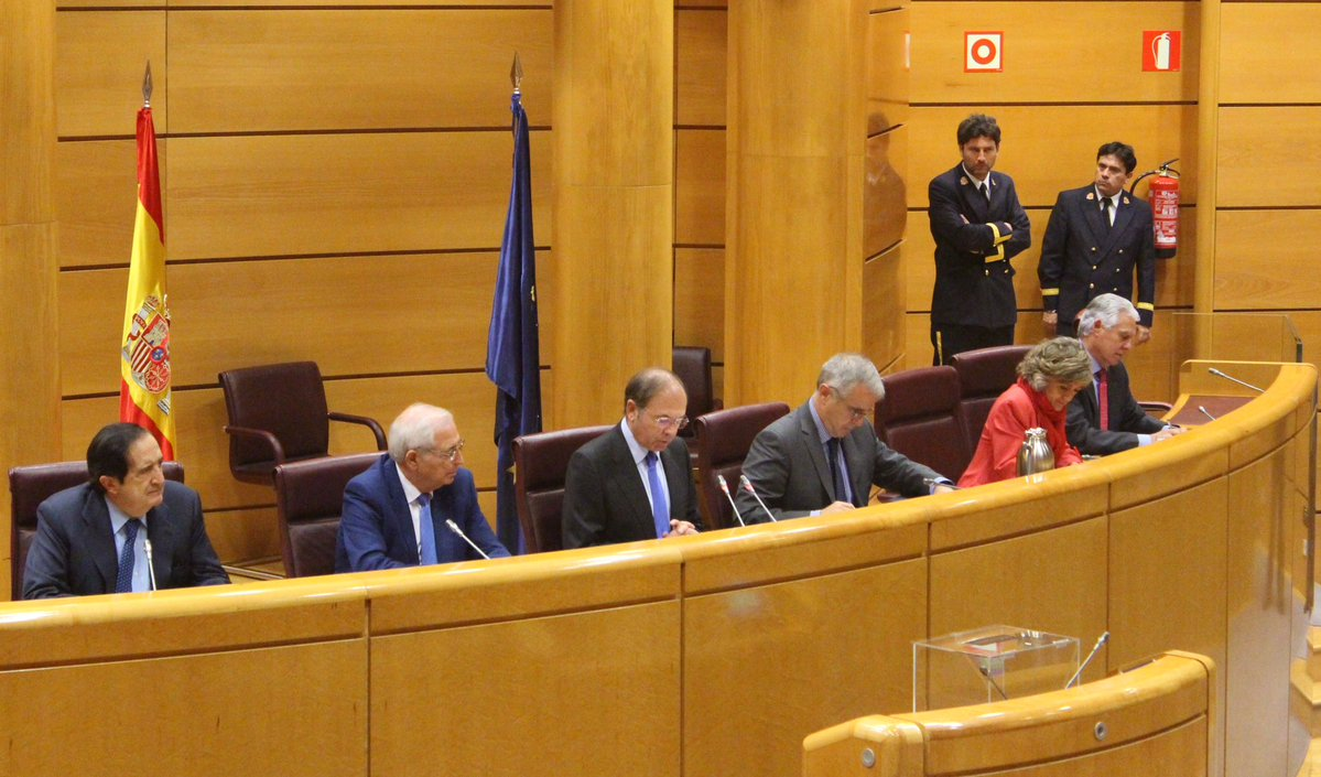 Juan José Imbroda nombrado vicepresidente de la Comisión Especial del Senado